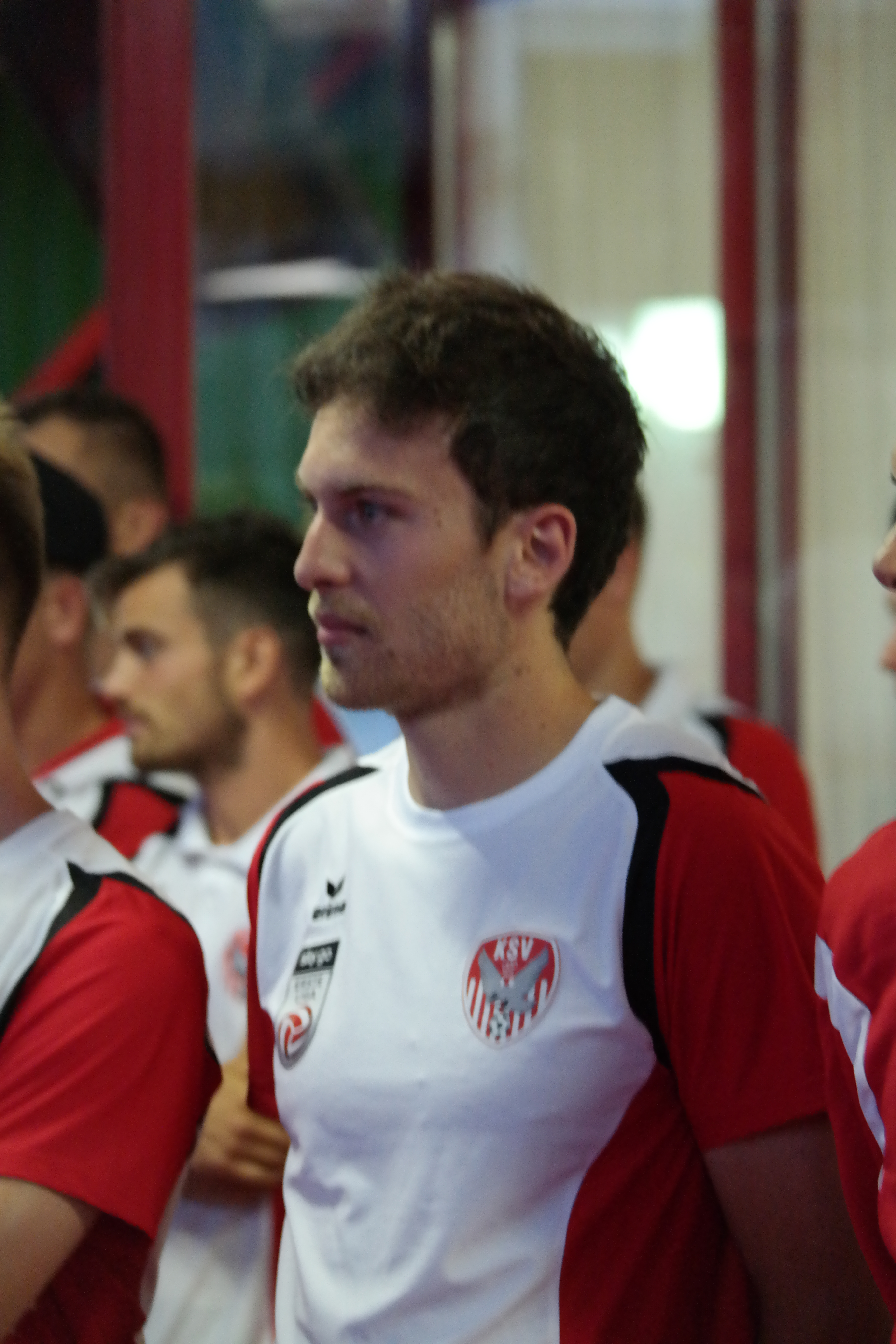 Mannschaftspräsentation der KSV im Juli 2017